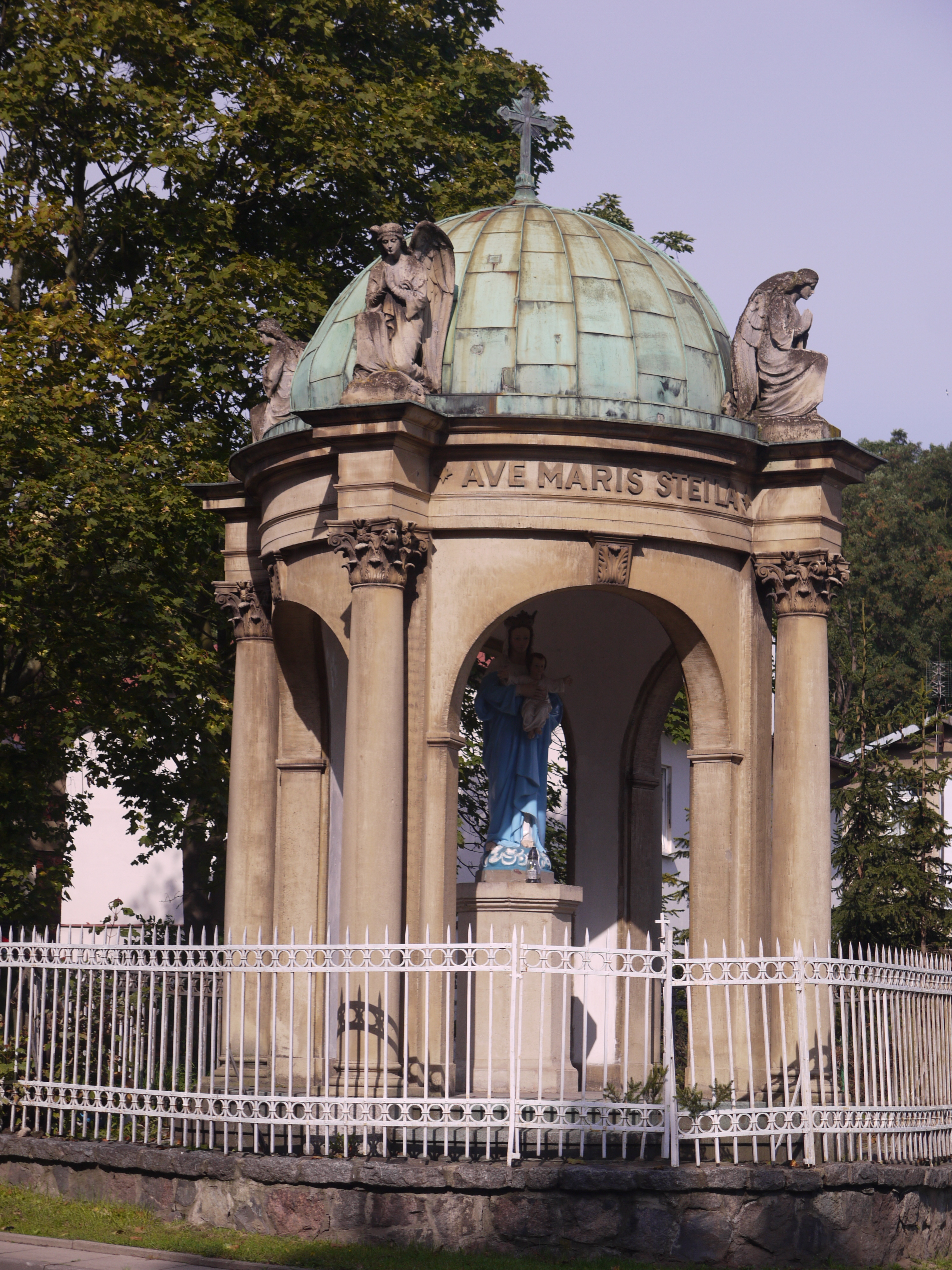 Kapliczka przydrożna, al. Niepodległości/ul. Malczewskiego, Sopot